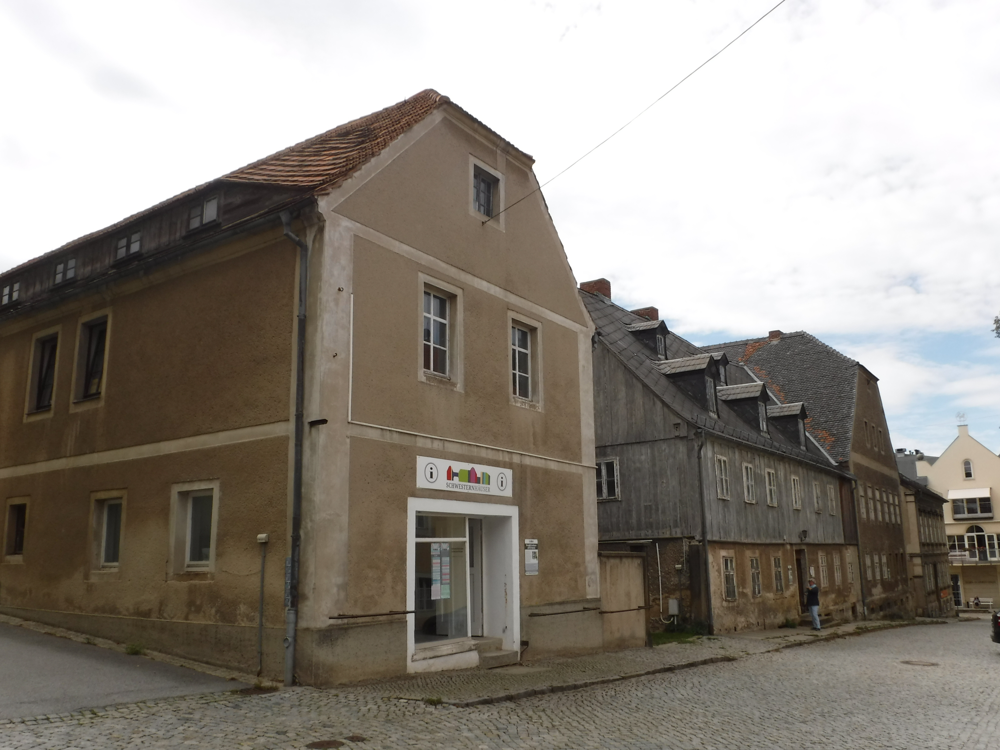 v.l.n.r.: Friedhofsweg 1, Zinzendorfplatz 7 und 6 und Peter-Buck-Straße 2, 02625 Bautzen-Kleinwelka. Im Hintergrund Peter-Buck-Straße 1